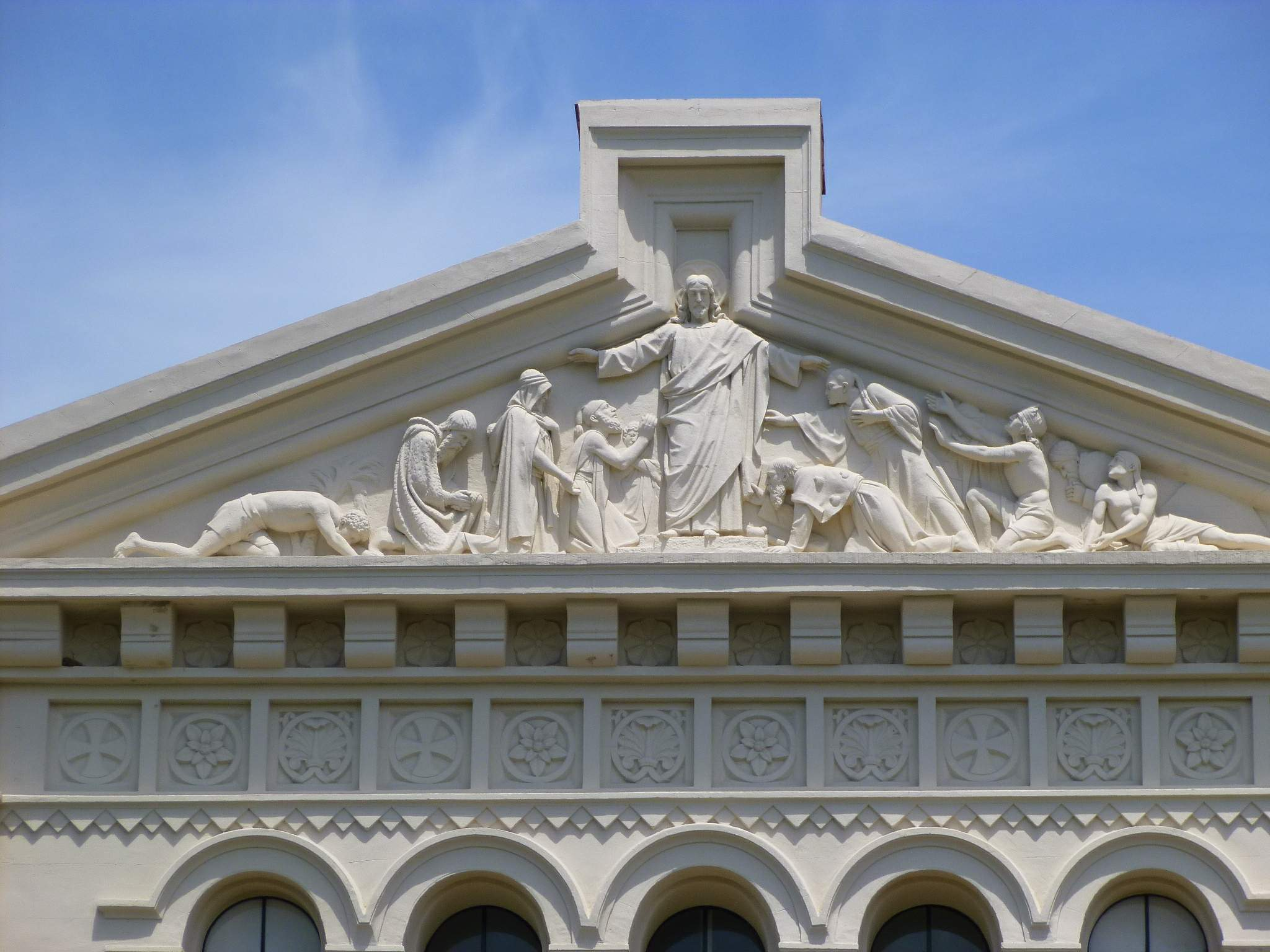 Universidad de Deusto (Bilbao)